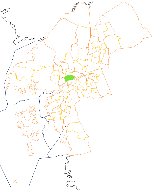 Karta som visar primärområdes belägenhet i Göteborg